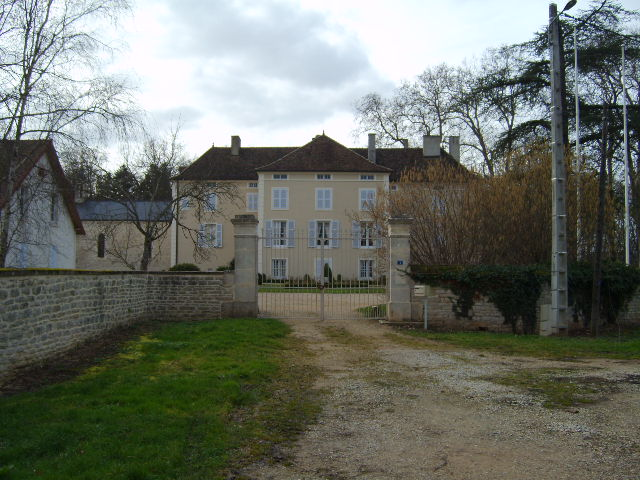 Château de Mimande.